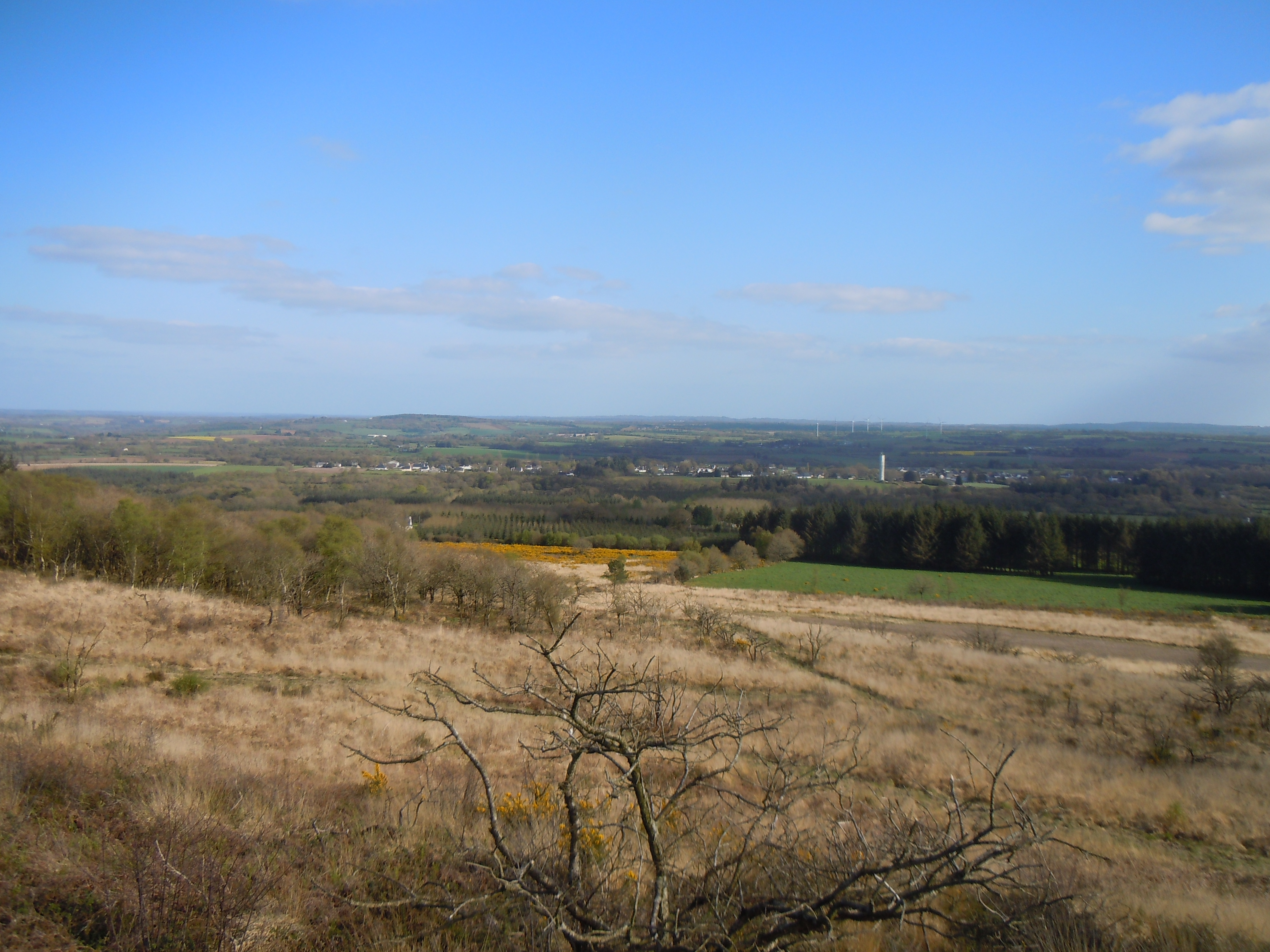 vue générale de Roudouallec (Morbihan) et de ses environs. photo prise des hauteurs des Montagnes Noires.